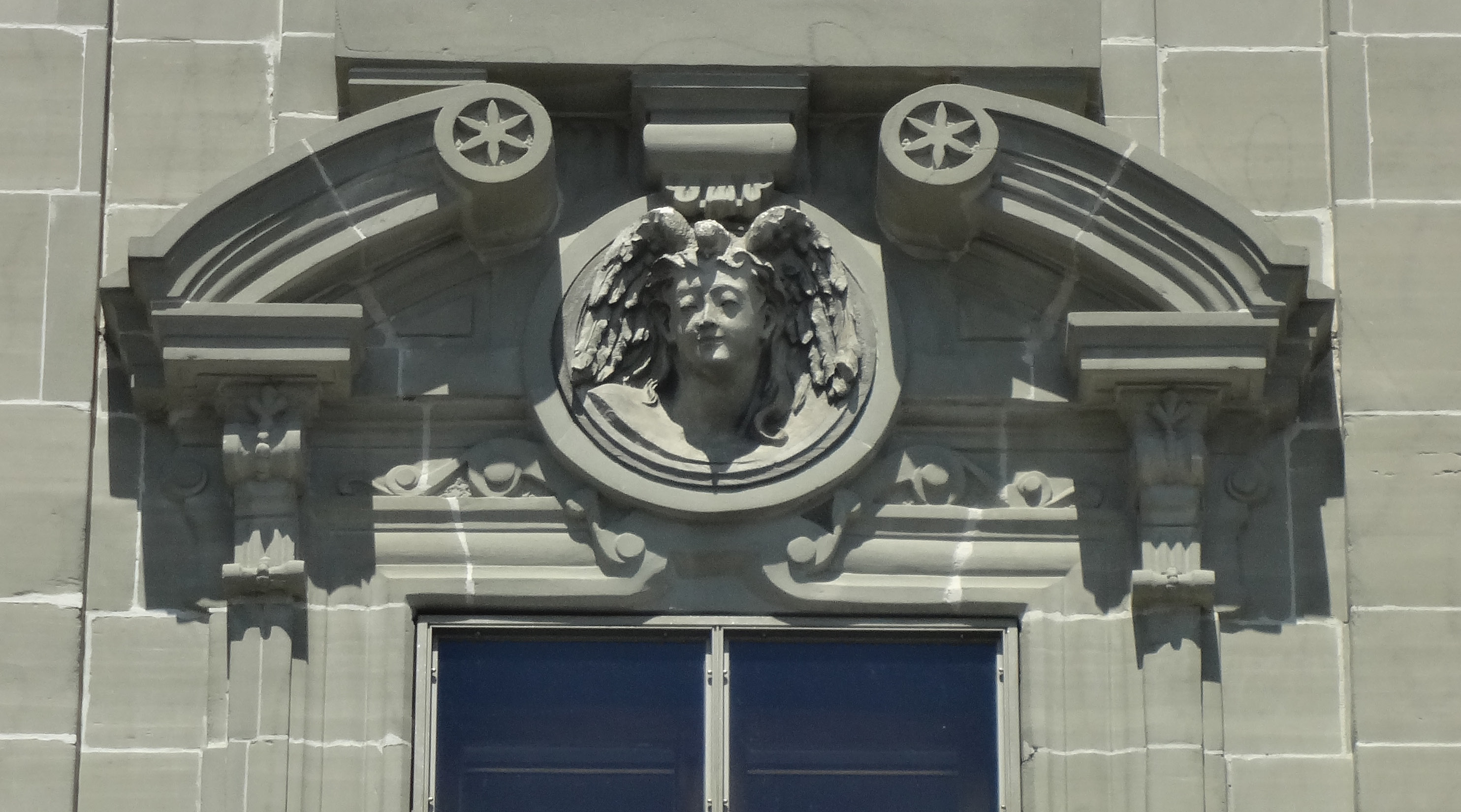 La Mouette du Lac Léman, poésie, 1876, médaillon en molasse, Quai Perdonnet et Place de l'Ancien-Port, Vevey